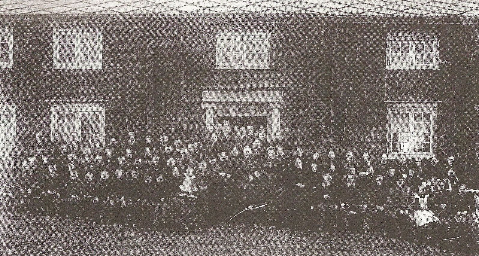 Johan L. Fløan og Gusta Oline Røkkes bryllup i 1900.